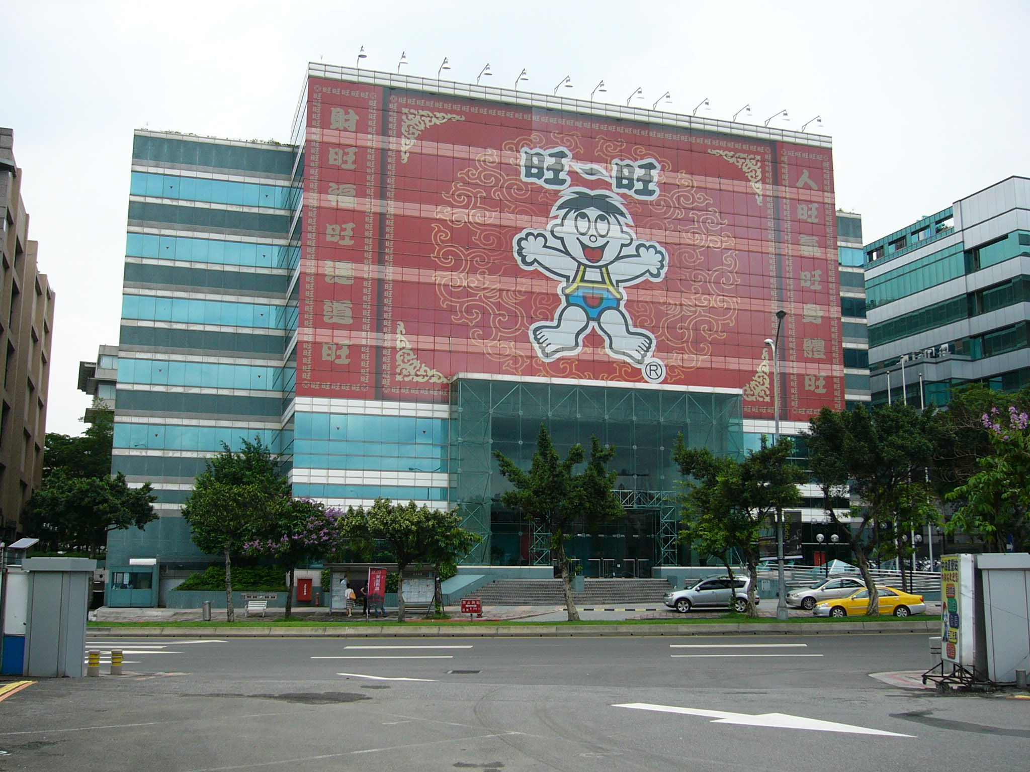 旺旺集團吉祥物「旺仔」登上時報廣場大樓正面。